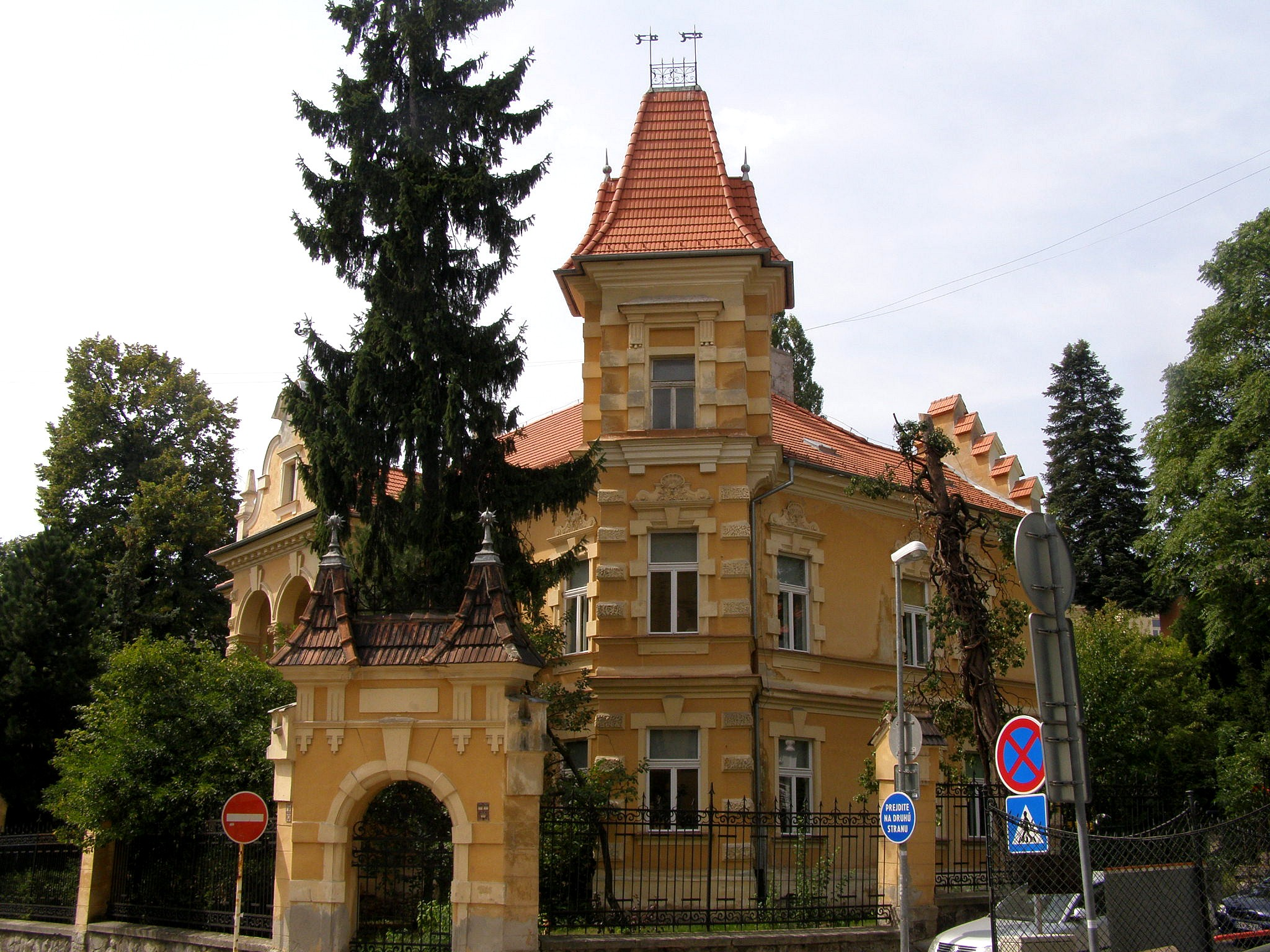 Kuzmányho ul. č. 9. Budovu postavili v roku 1894 a až do svojej smrti v nej žil dr. B. Michaelis, ktorý bol pôvodne lekárom generálneho štábu. Dnes je v nej škôlka a detské jasle Object location48° 08′ 58.92″ N, 17° 06′ 12.96″ E